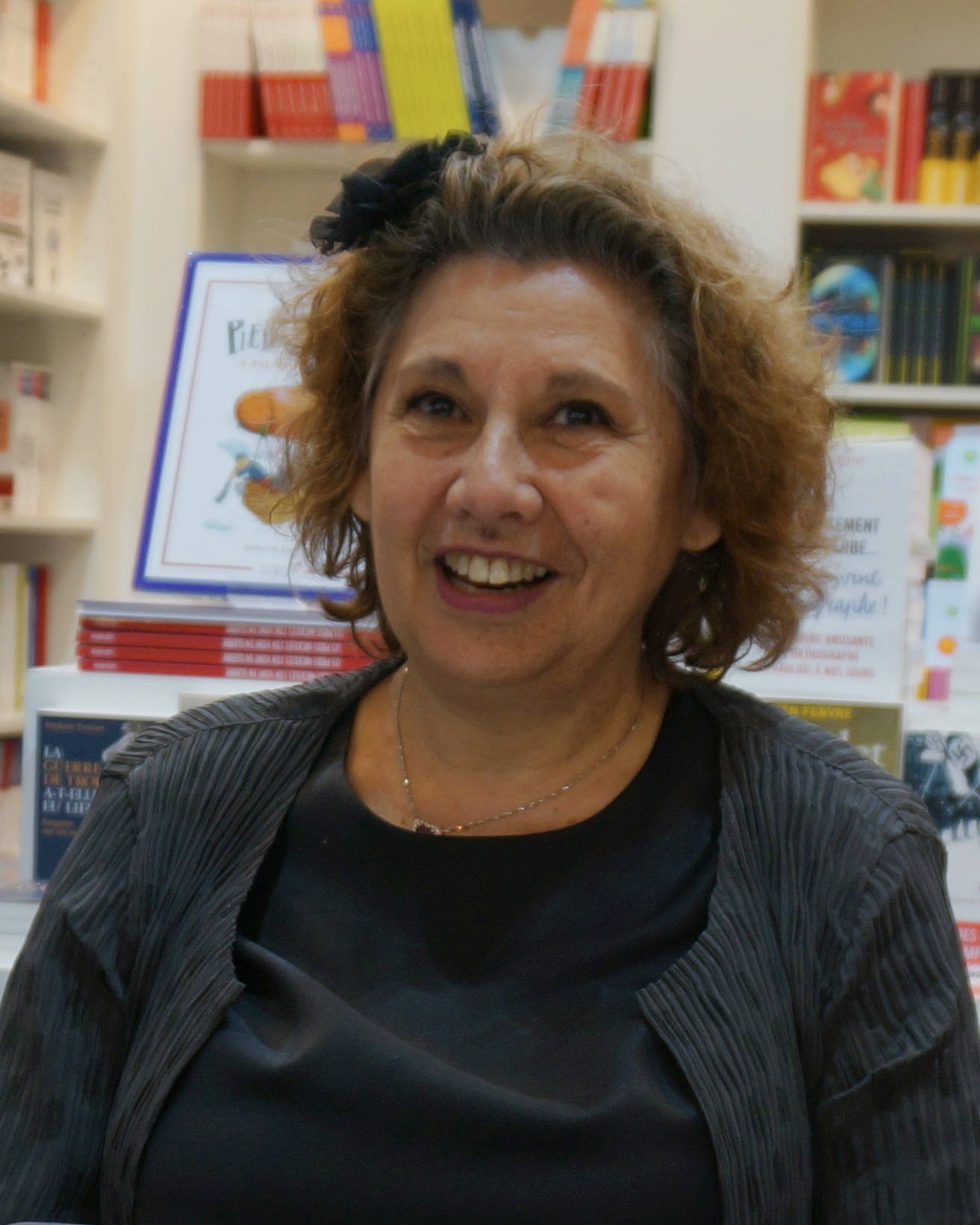 lors du salon du livre de 2015.